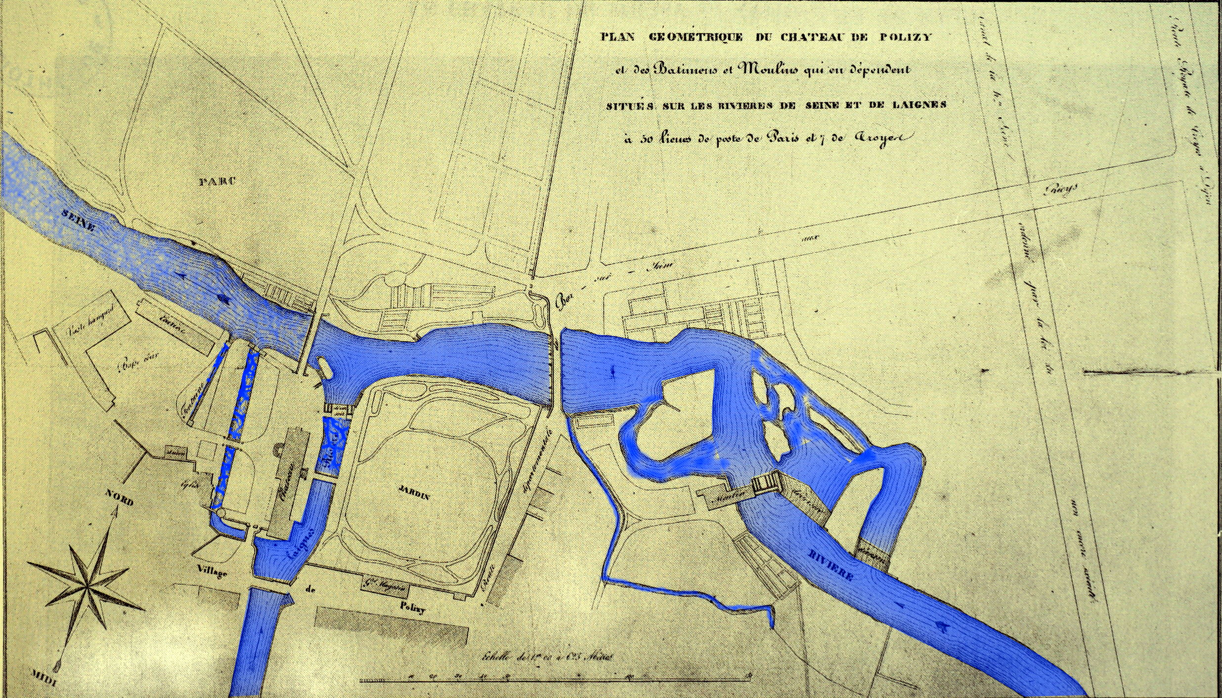 desiin issu de